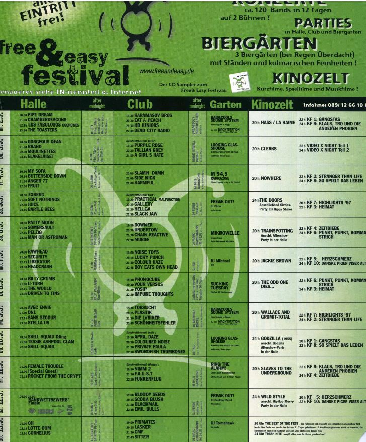 Screenshot eines Alten Programmheftes von 1997 für das Free & Easy Festival